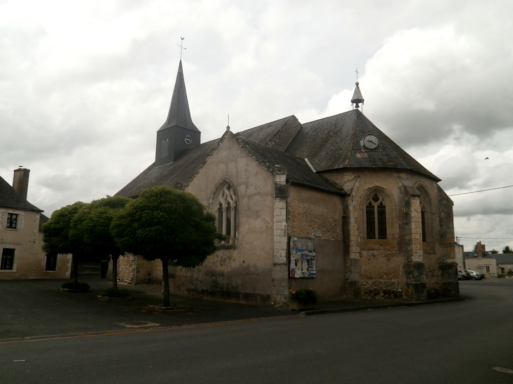 L'église de Courcelles-de-Touraine